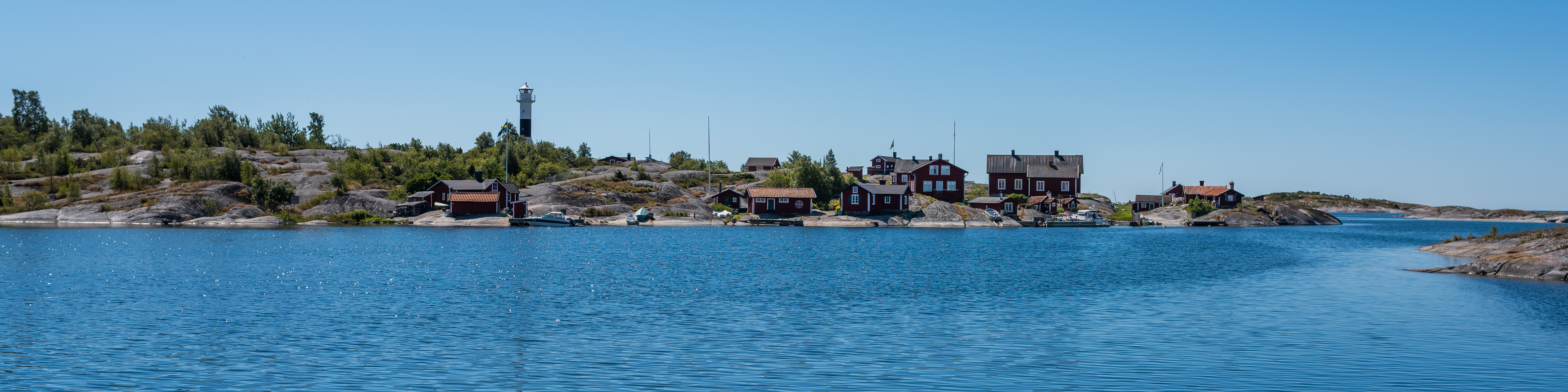 Huvudskär Dalarö Sweden July 2016